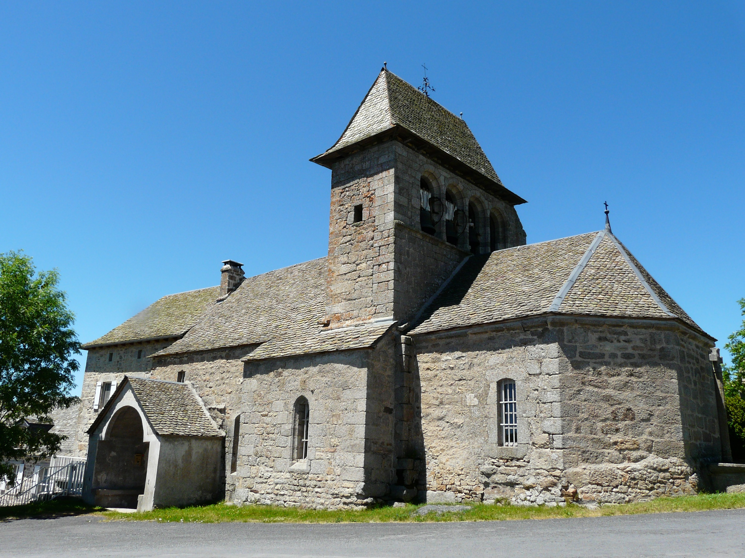 L'église de Jabrun, Cantal, France.